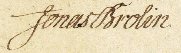 Brolins namnteckning på Grundritning öfver i synnerhet den inre delen av Gefle stad